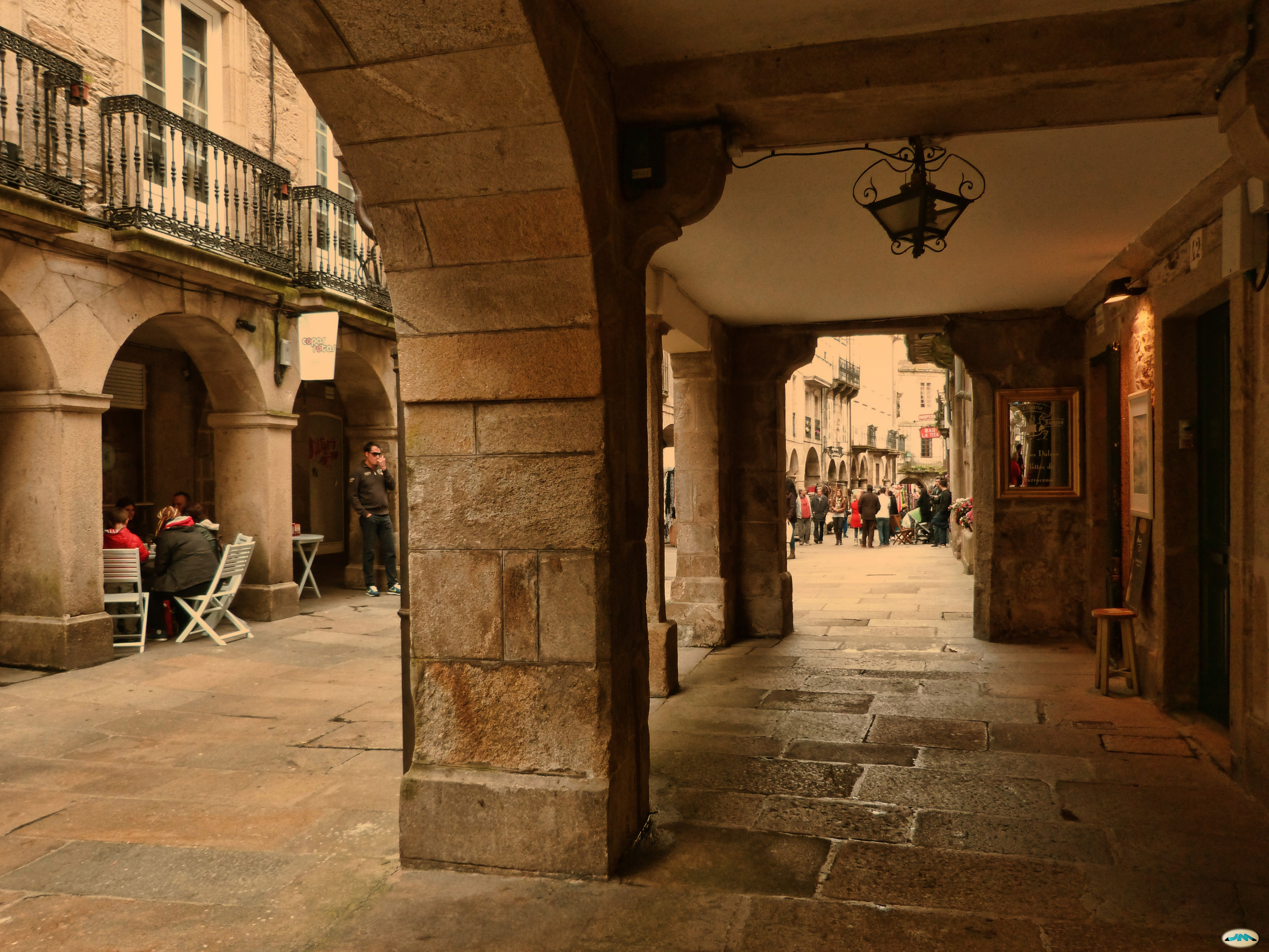 Santiago-Parcial de la Rúa Nova